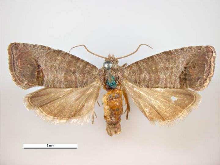 Cydia pomonella female, dorsal view